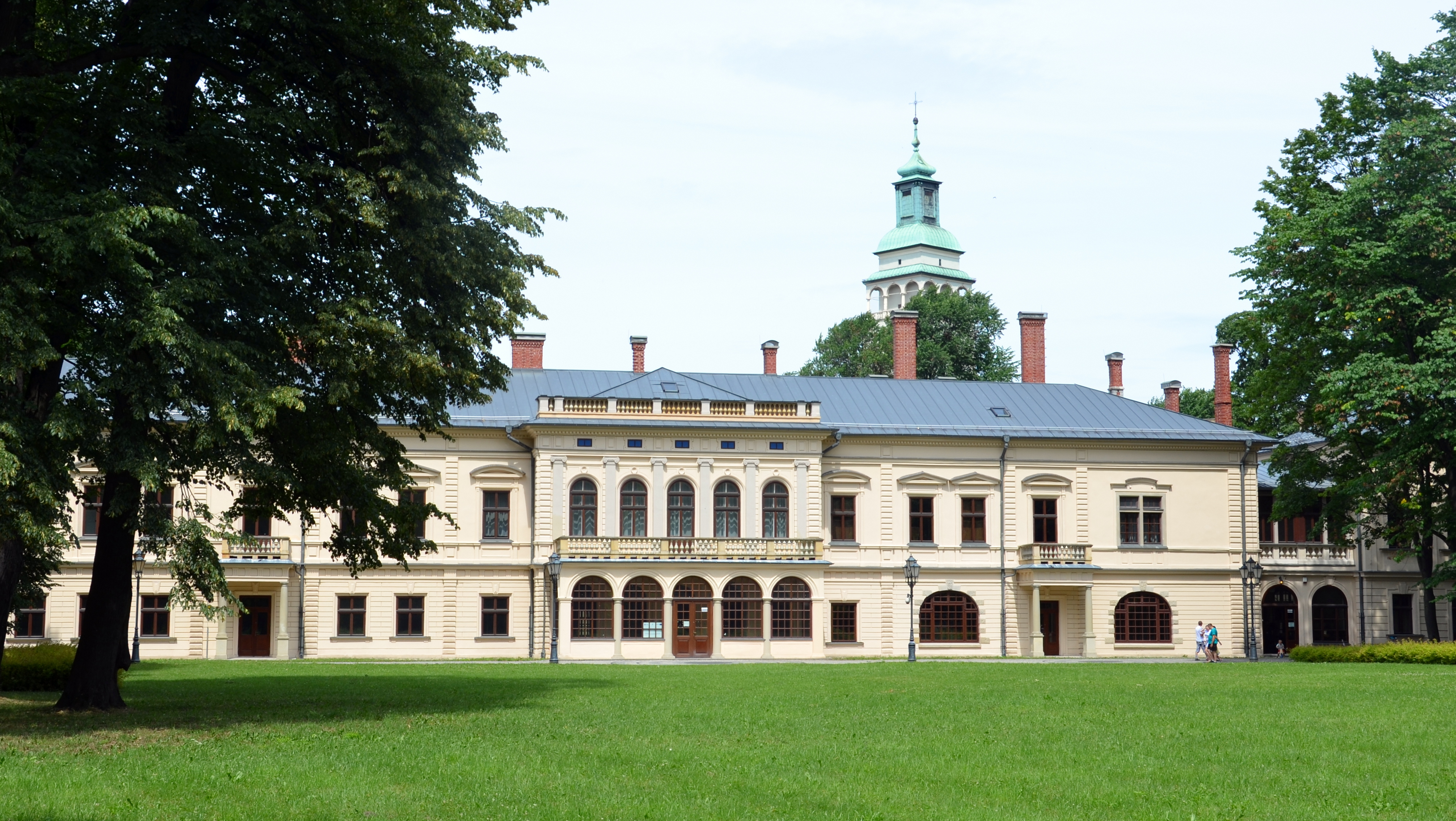 Habsburger Schloss Zywiec-Saybusch